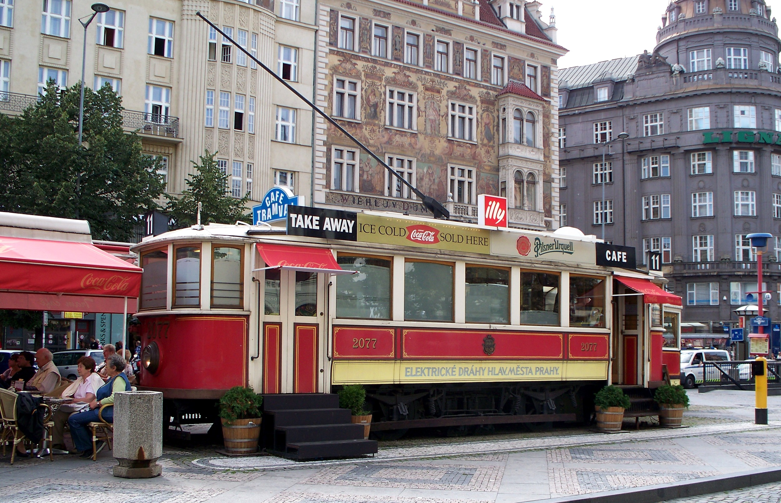 Das Cafe Tramvaj auf dem Wenzelsplatz in Prag.